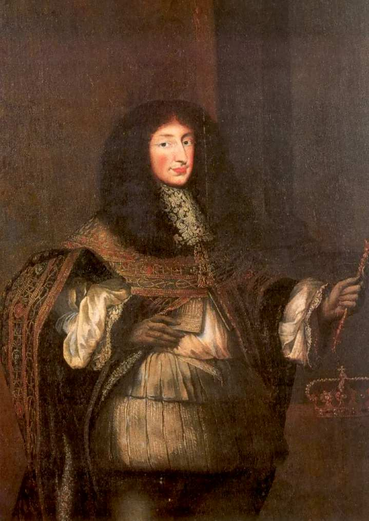 Ritratto di Carlo Emanuele II di Savoia (1634-1675)